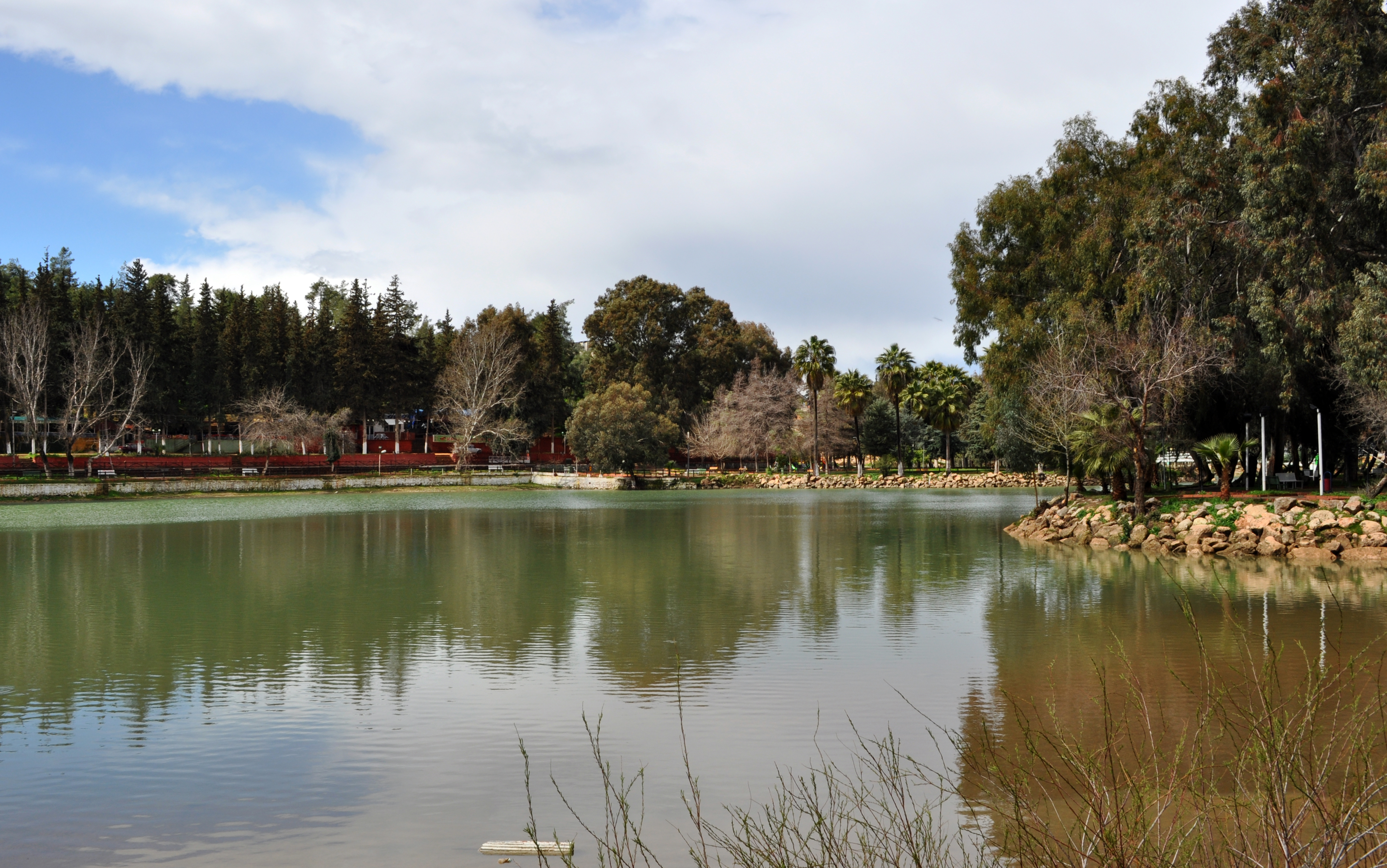 Reyhanlı Gölü